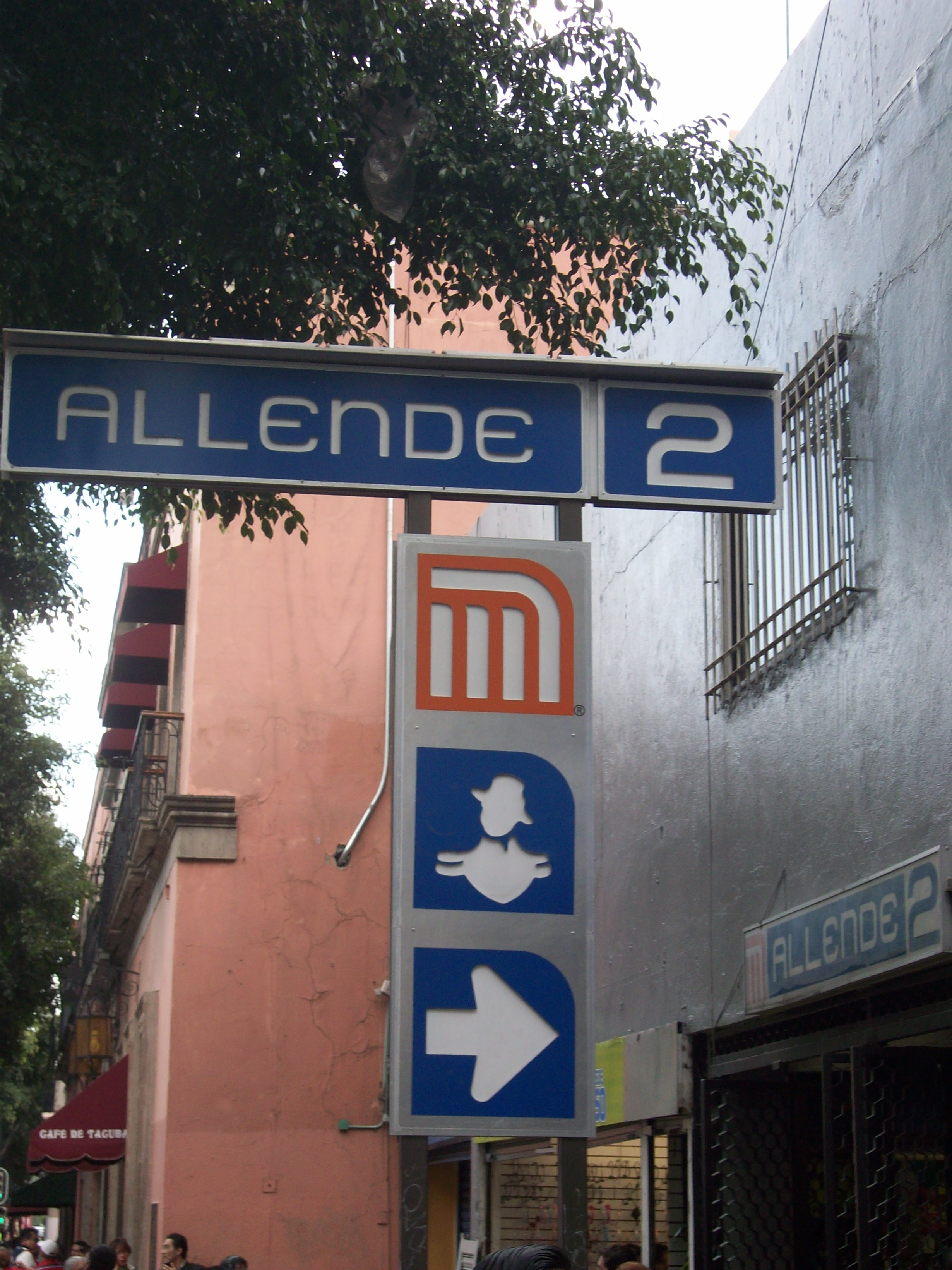 Estela estacion Allende